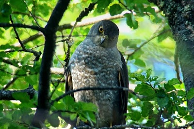 Accipiter chilensis